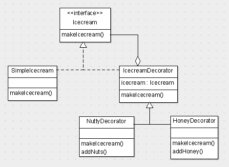 UML diagram praktického využití návrhového vzoru dekorátor (zmrzlina)